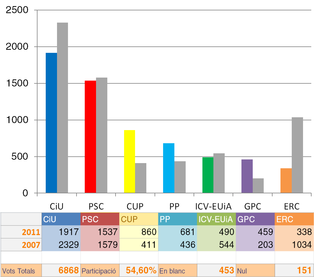 Resultado de las elecciones municipales de Cardedeu el 2011.